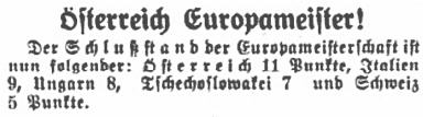 Österreichische Tageszeitung vom 29 November 1932 zum Endstand der Europameisterschaft 1932 Transcript: Österreich Europameister! Der S c h l u ß s t a n d der Europameisterschaft ist nun folgender: Österreich 11 Punkte, Italien 9, Ungarn 8, Tschechoslowakei 7 und Schweiz 5 Punkte.